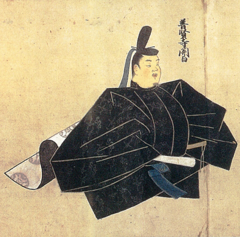 近衛基通の肖像画。